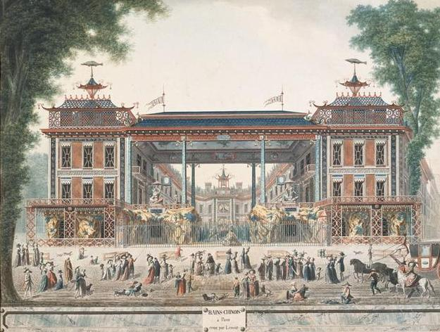 Les Bains chinois, construits sur à l'emplacement du 29 Boulevard des Italiens à Paris par l'architecte Nicolas Lenoir en 1787, abritaient, outre des bains, un restaurant, un café et un magasin de mode. Ils furent détruits en 1853.